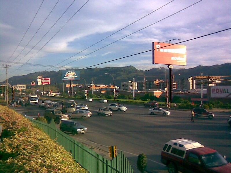 Vista de la Av. Intercomunal Guarenas - Guatire.